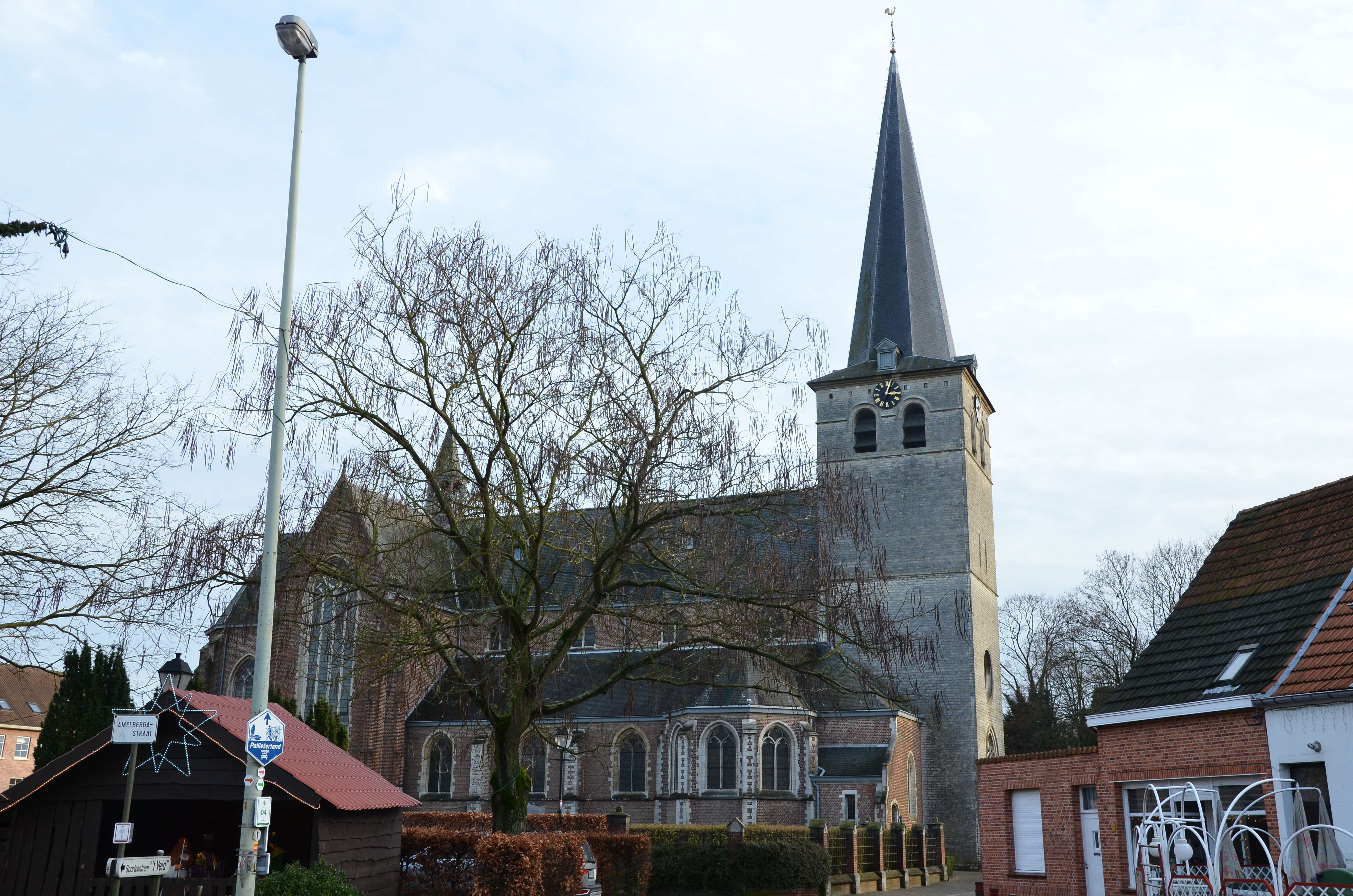 Sint-Amelbergakerk te Zandhoven vanaf noorden